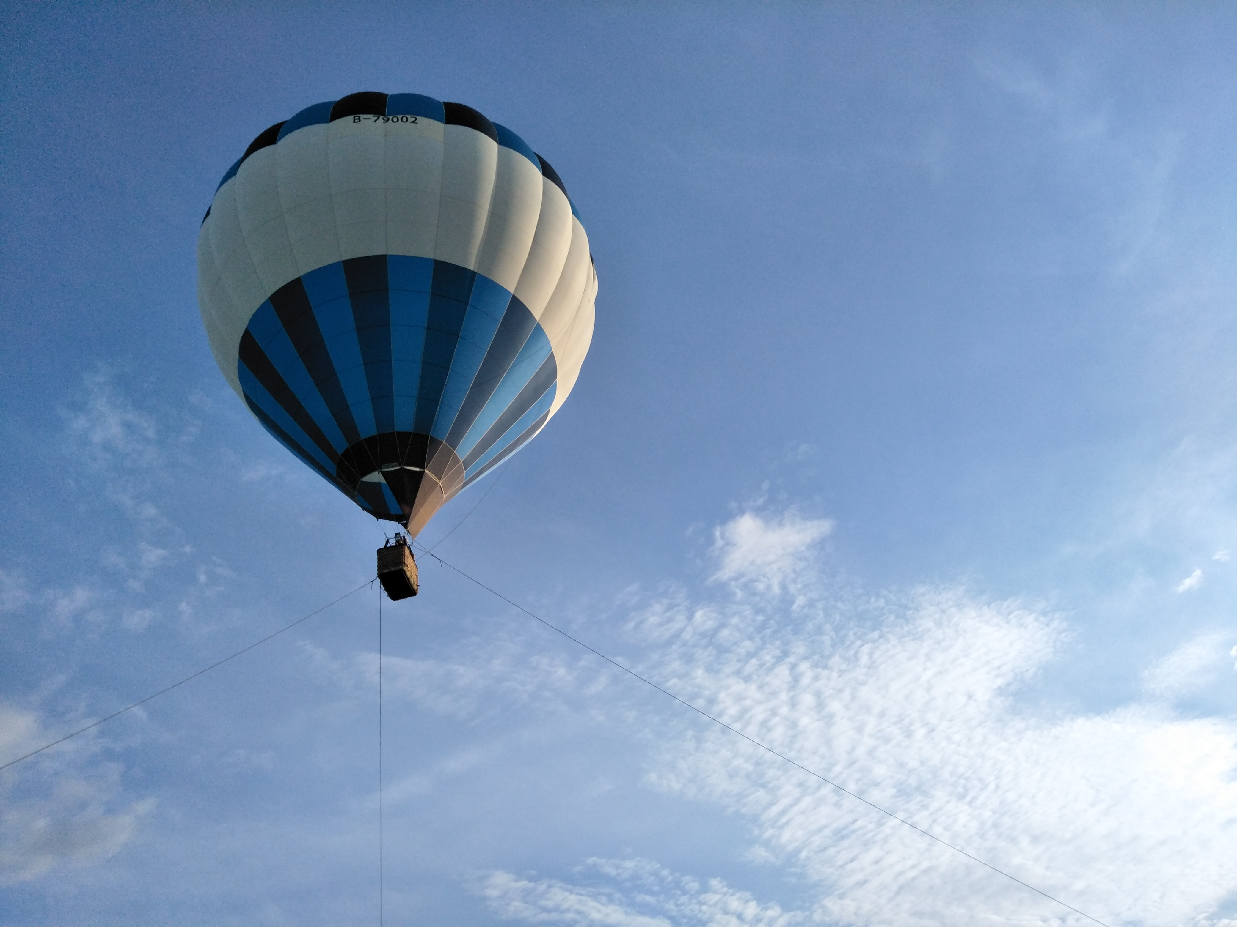 拍攝時間:2018/08/17 地點:台東鹿鳴酒店外部草地 拍攝工具:智慧型手機